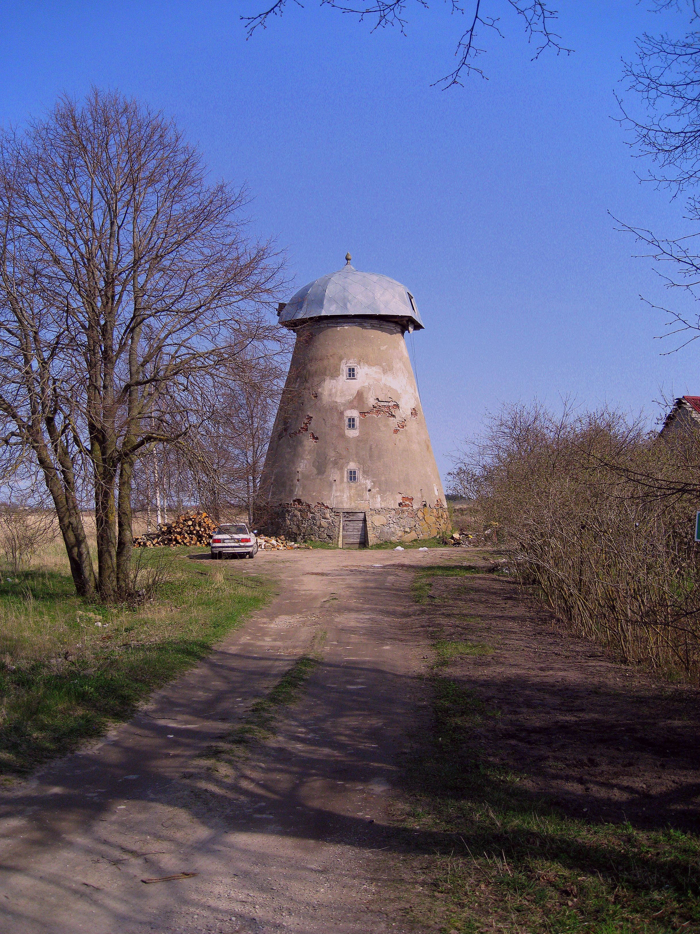 Pasiekstes vējdzirnavas (darbojušās visilgāk Latvijā – līdz pat 60-tajiem gadiem).